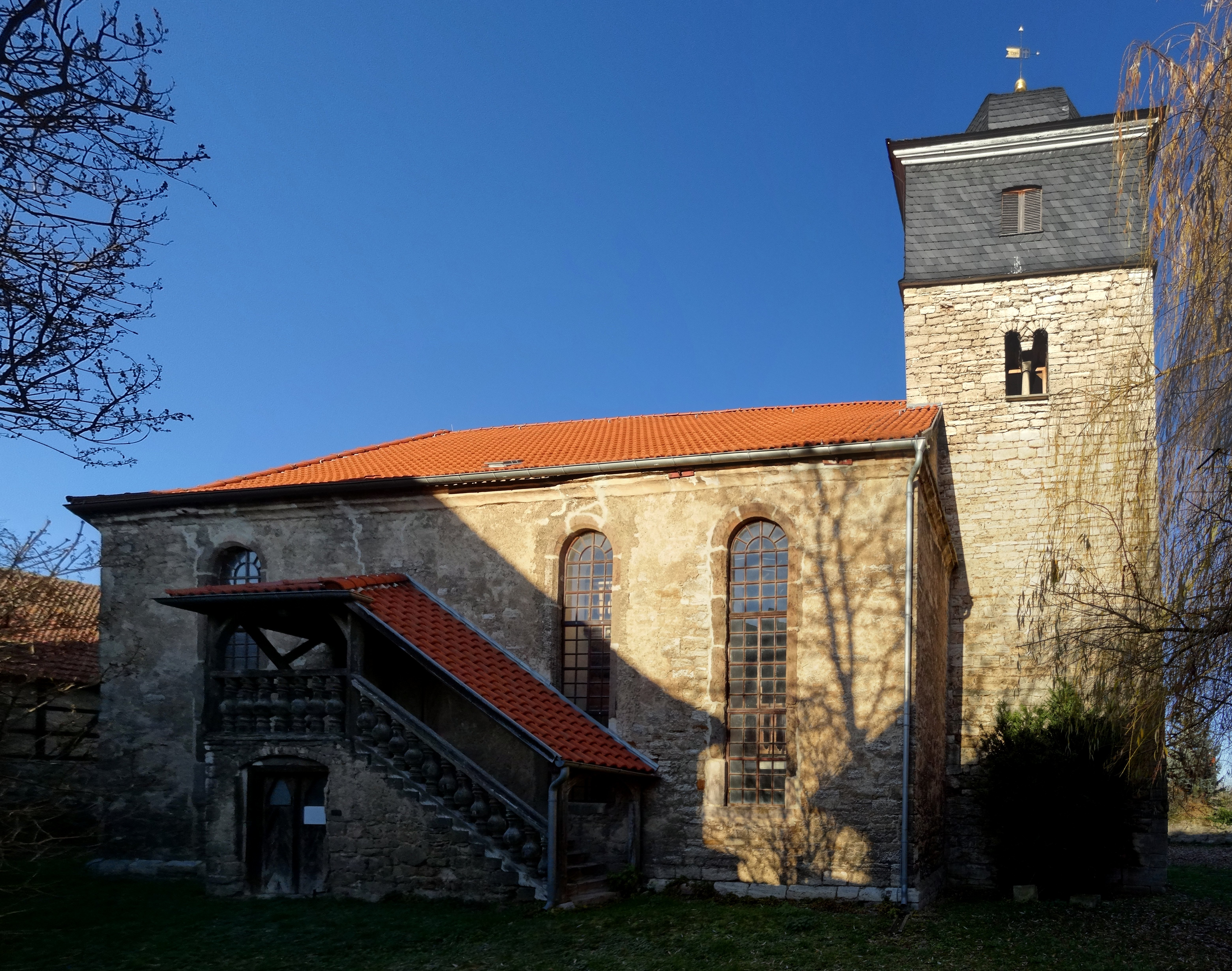 Martinikirche Westgreußen mit separaten Emporen-Zugängen